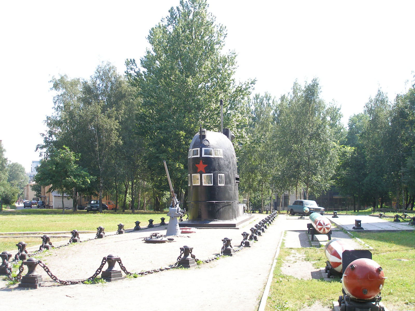 Музей подводных сил России имени Александра Ивановича Маринеско (Санкт-Петербург)